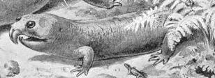 Rhynchosaurus.